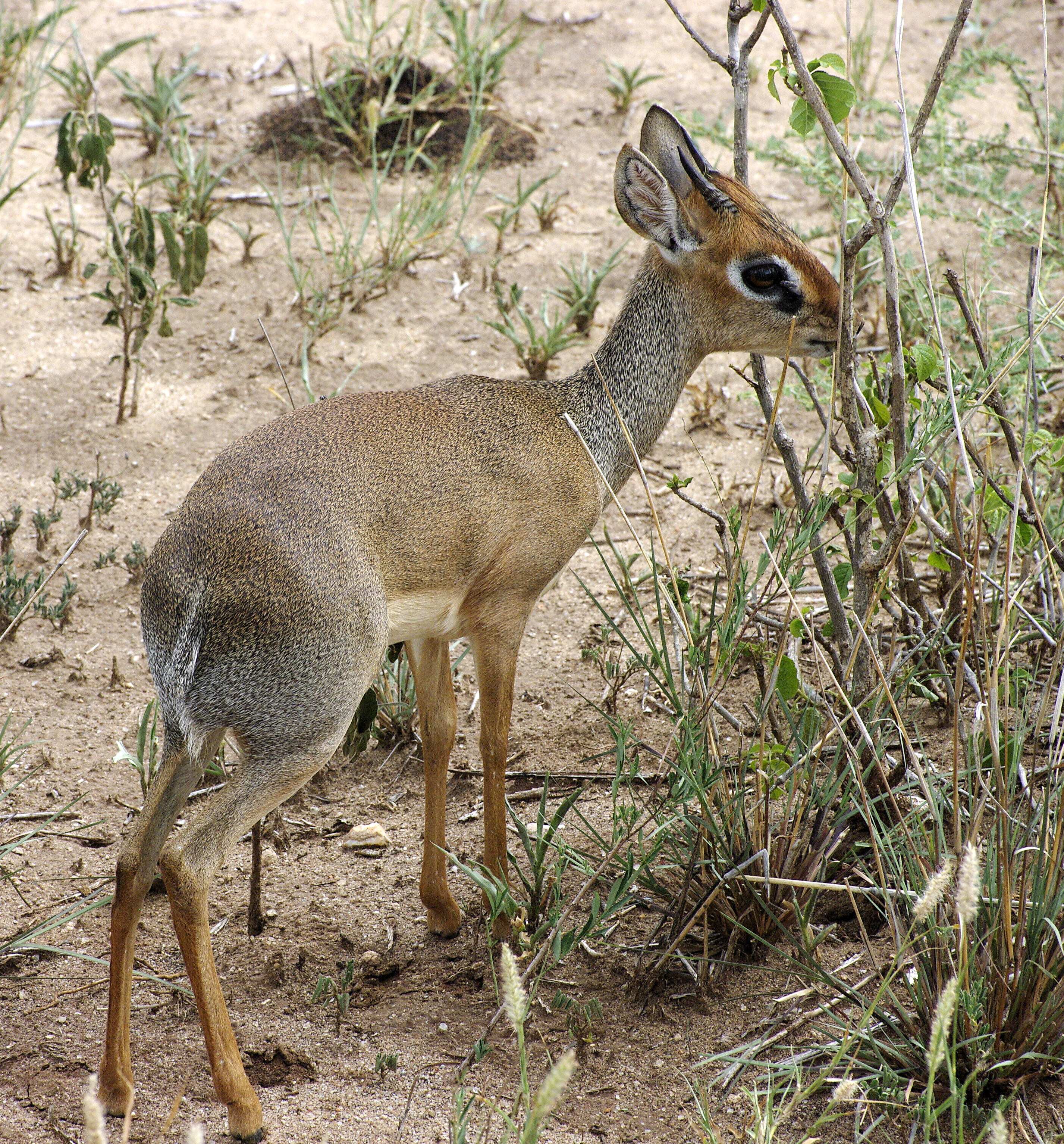 Dik-dik de Kirk photographié dans la région du Tarangire en Tanzanie.